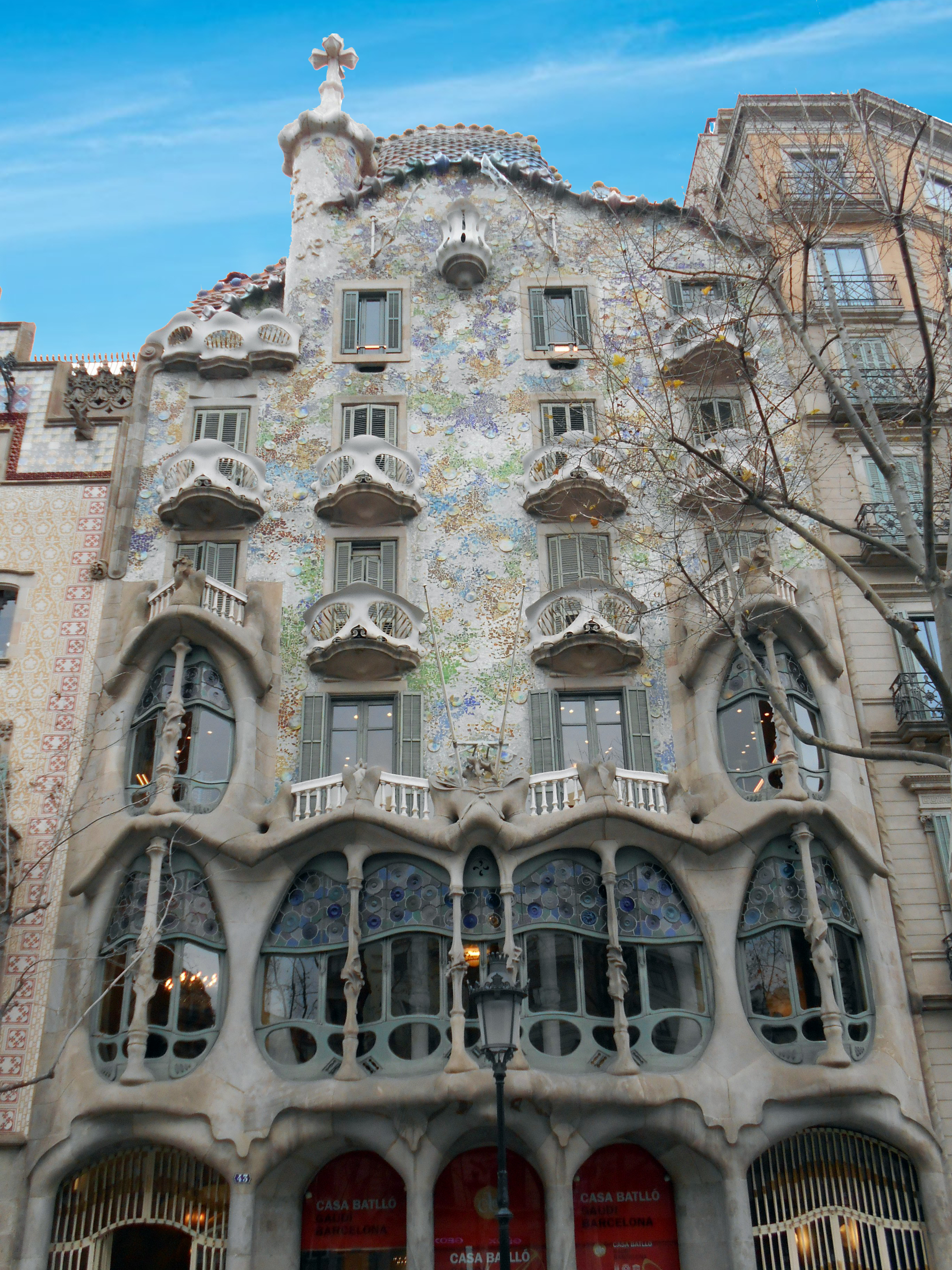 Casa Batlló, Antoni Gaudí.